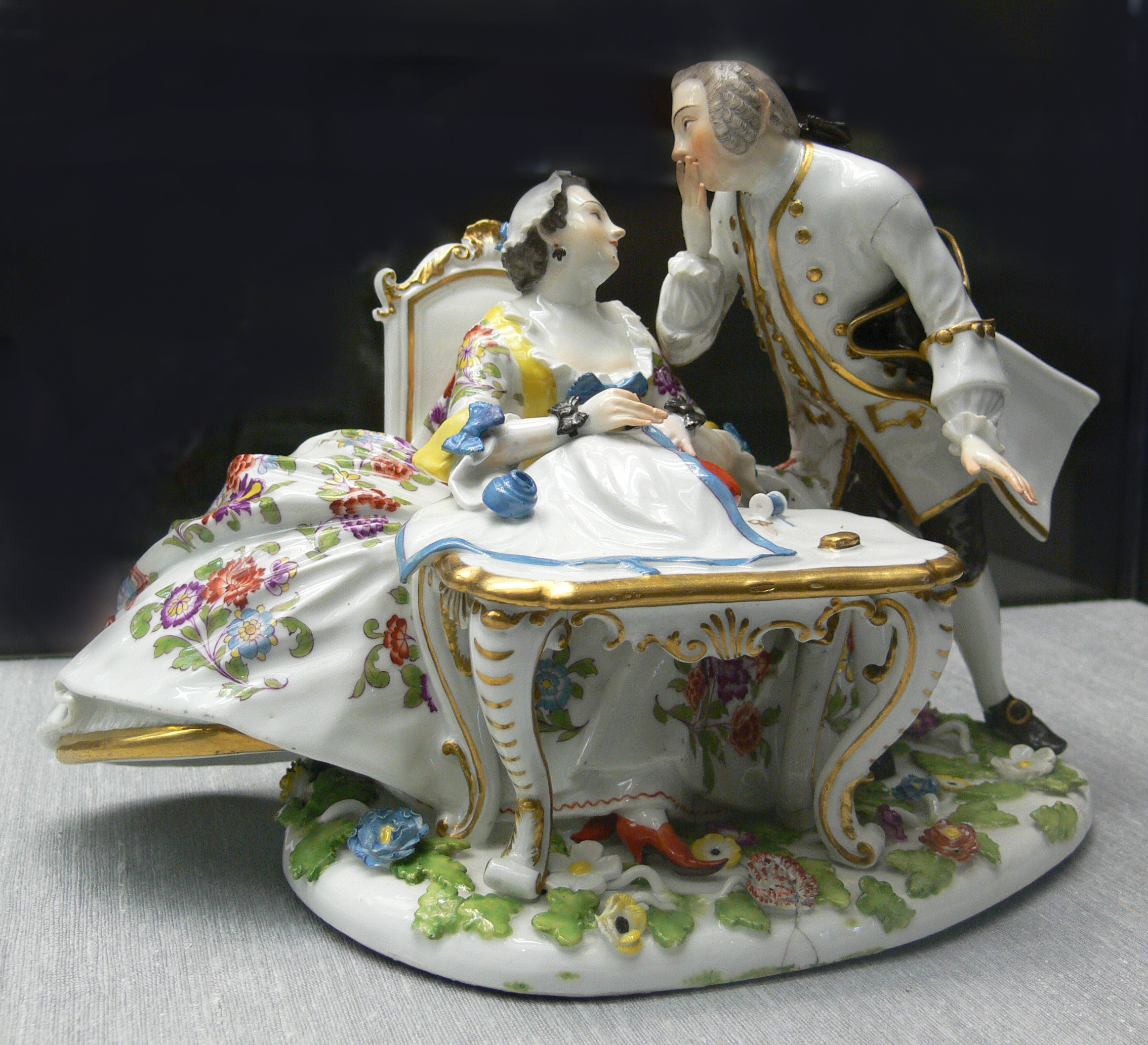 Freimaurerpaar, Porzellan, Meißen um 1745 Kunstgewerbemuseum Berlin, Inv. Nr. HF 225